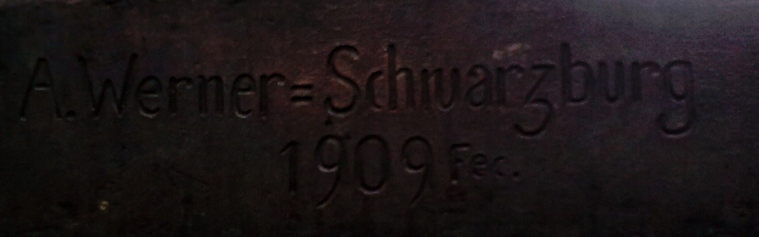 Nowa Ruda, Rynek - Fontanna z grupą figuralną św. Jana Chrzciciela i Jezusa w scenie chrztu, 1909